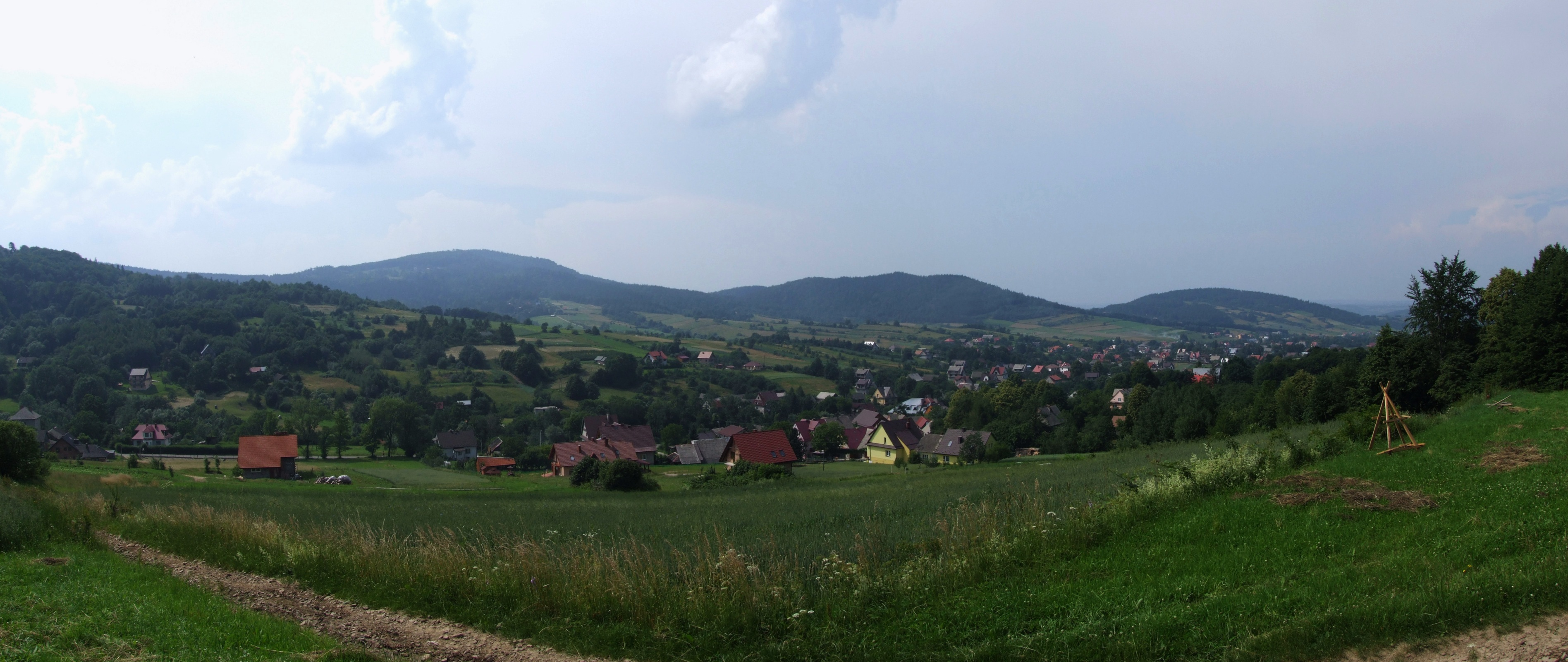 Widok z zielonego szlaku turystycznego Poręba - Kamiennik Północny. Od lewej:Uklejna, Grodzisko, Krowia Góra